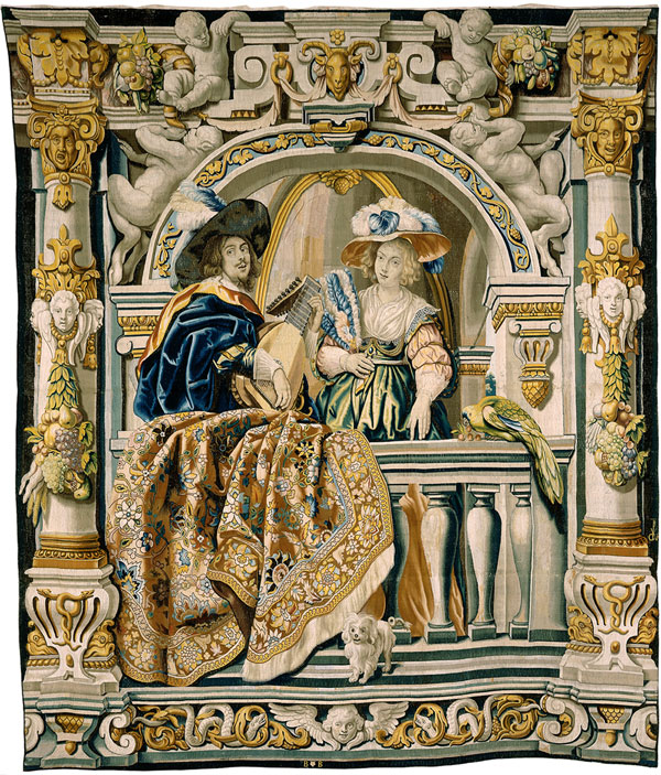 Szenen aus dem Landleben: Lautespielender Kavalier mit Dame. Wolle und Seide. Brüssel, 2.Viertel 17. Jh.